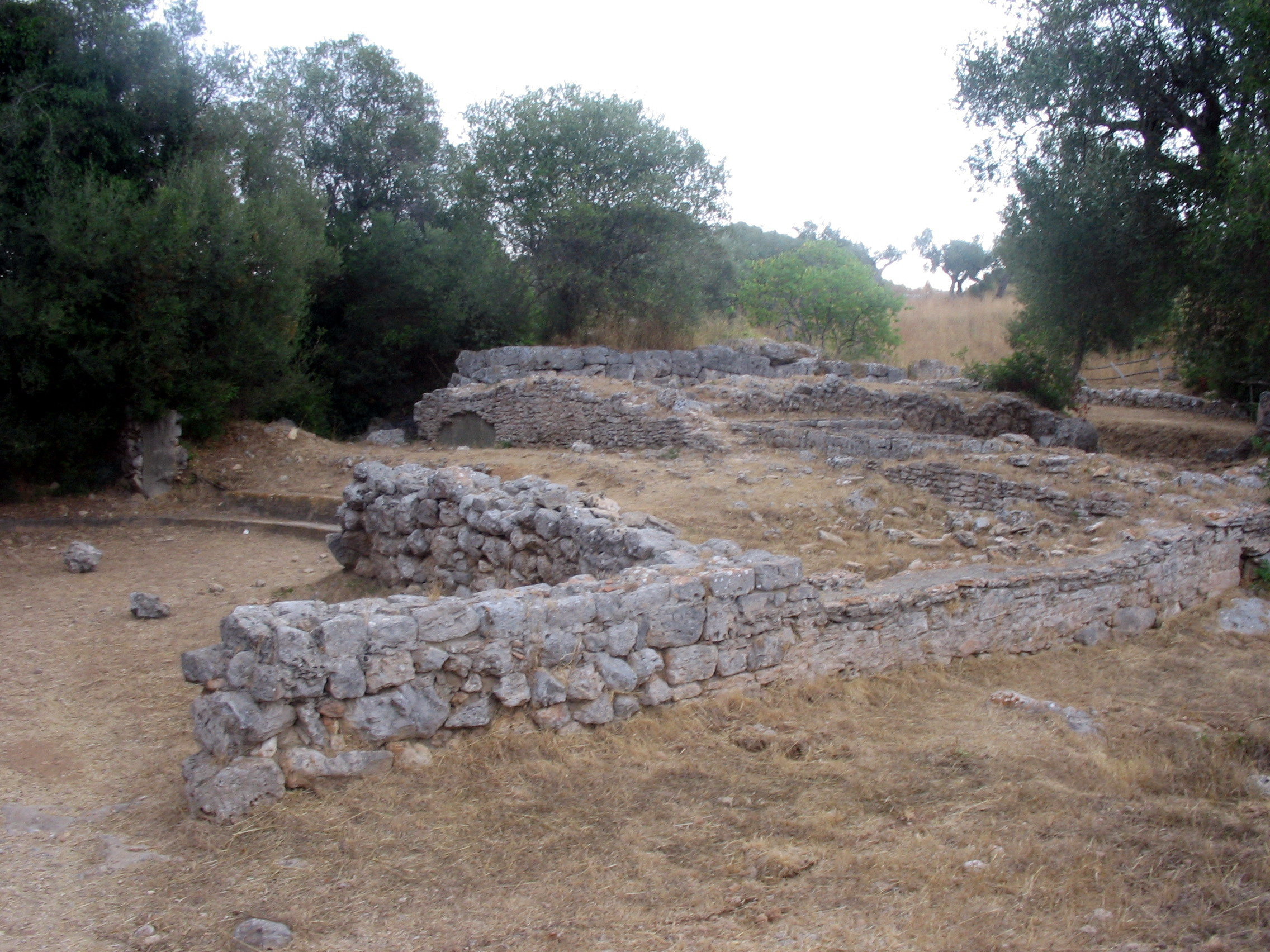 Cosa, Ansedonia, Orbetello, Toscana, Italia